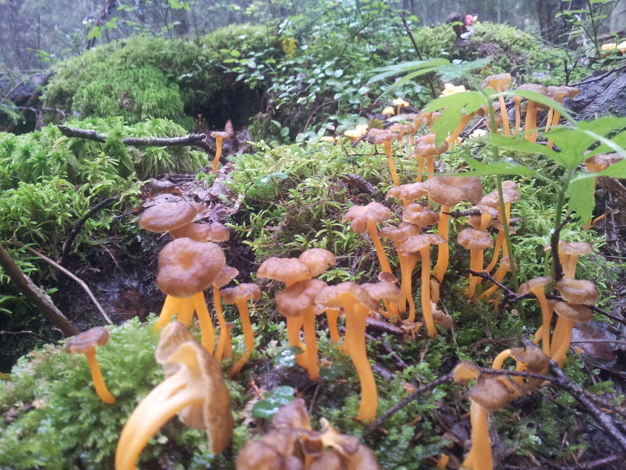 Mushroom